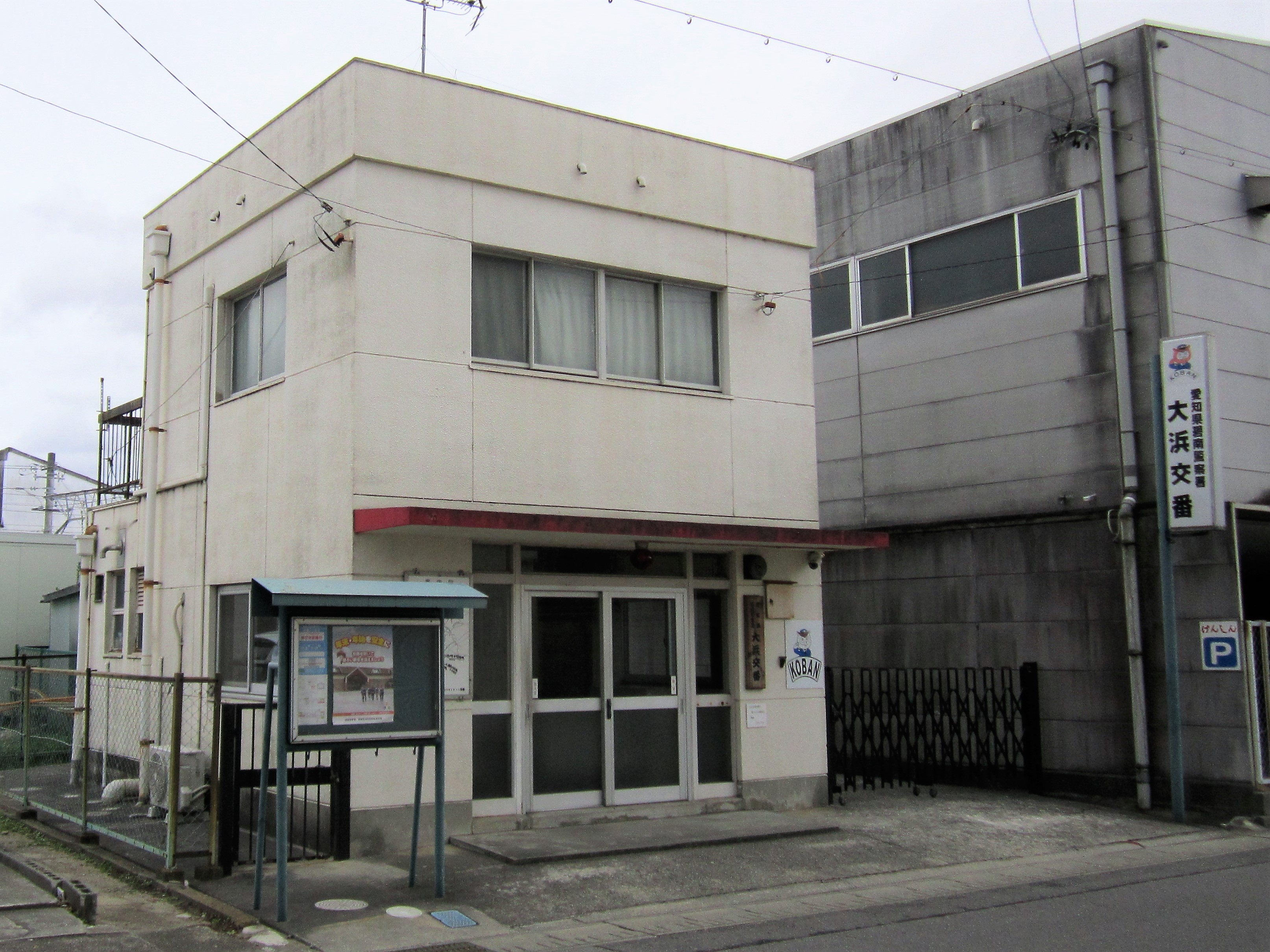 碧南警察署 大浜交番（碧南市中町） Canon PowerShot A2200